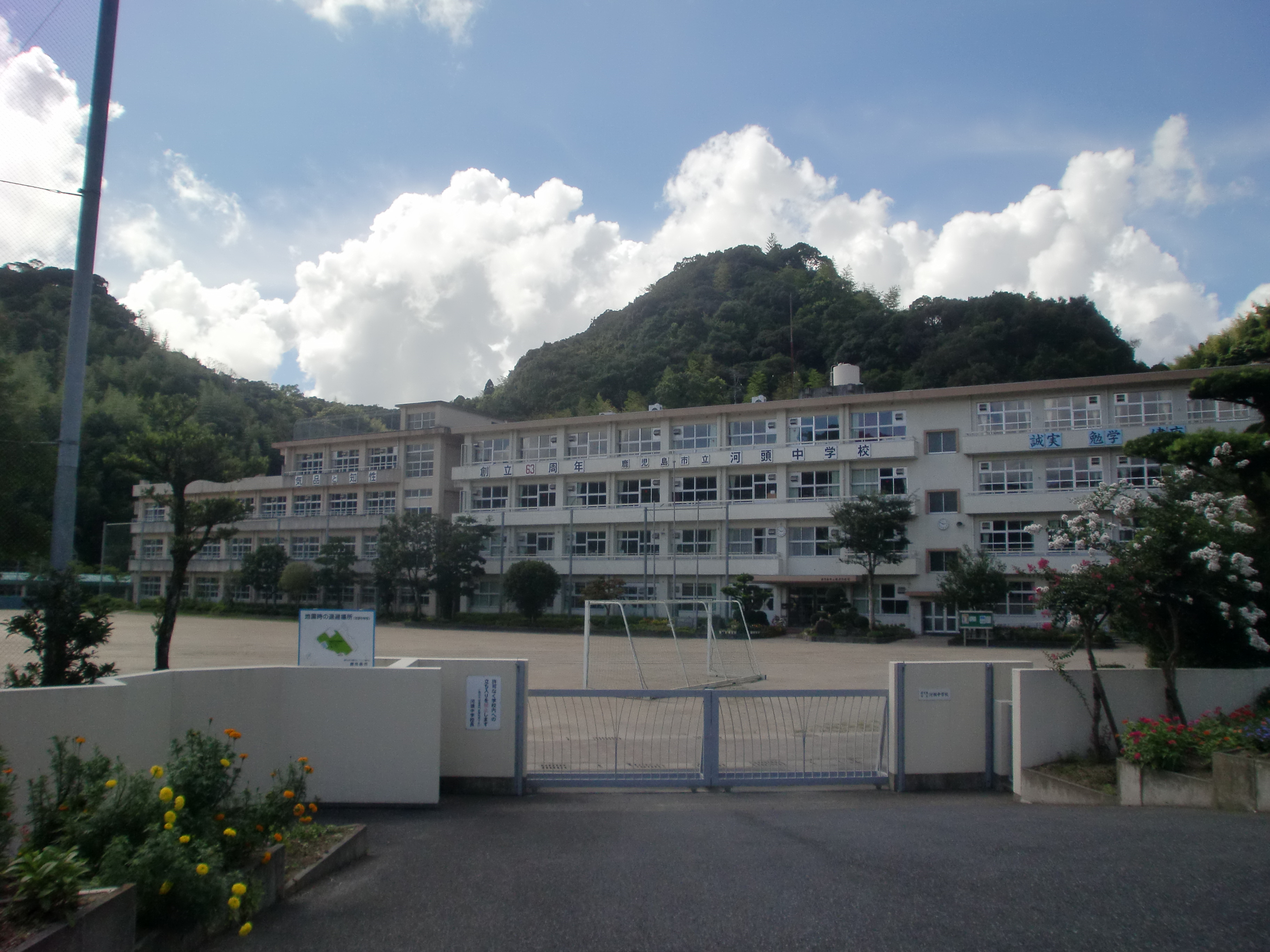 鹿児島市立河頭中学校の外観。